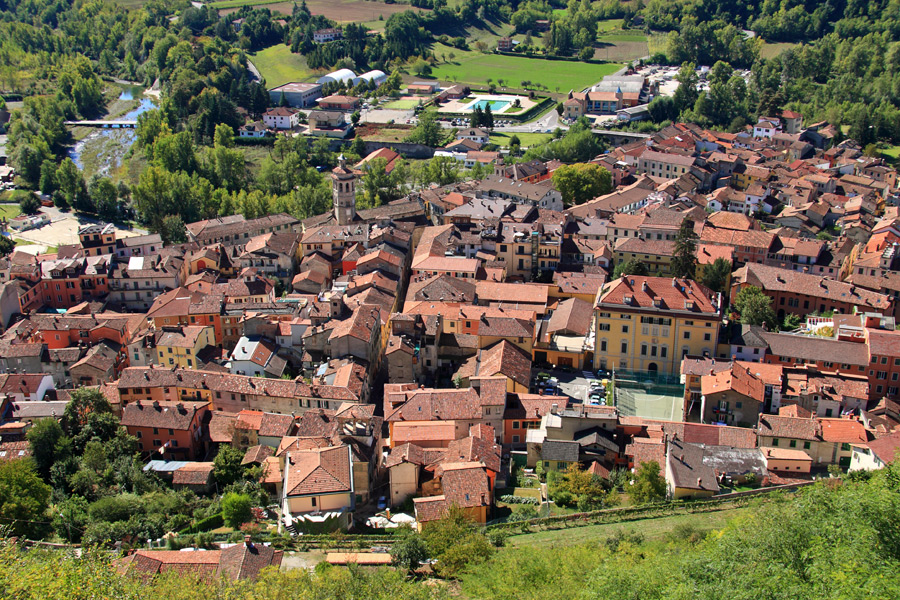 Panorama del centro storico di Gavi dall'omonimo forte che sovrasta l'abitato